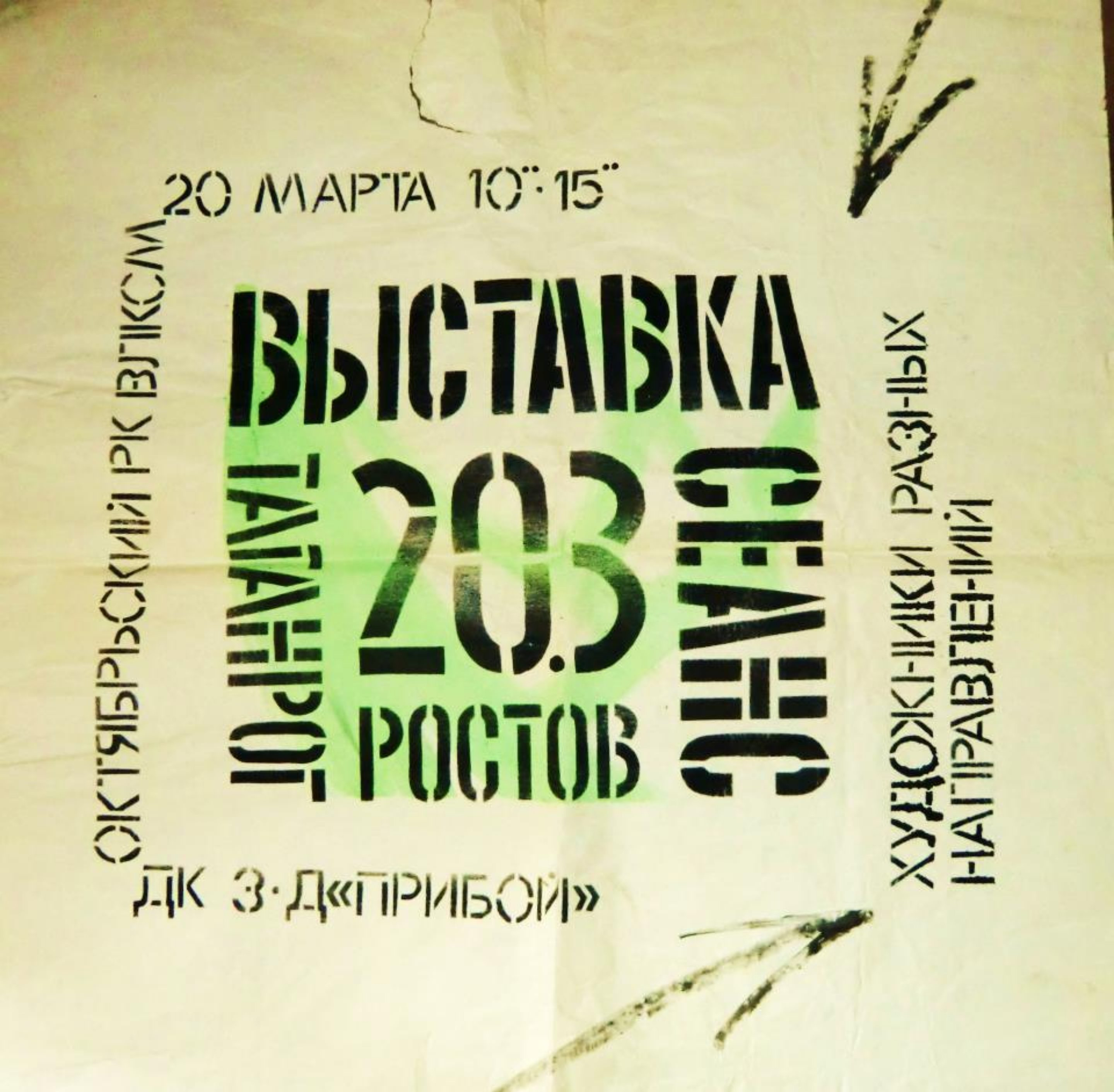 Рукописная афиша "Однодневной выставки" будущего товарищества "Искусство или смерть", Таганрог, ДК з-да "Прибой", 19.03.1988.